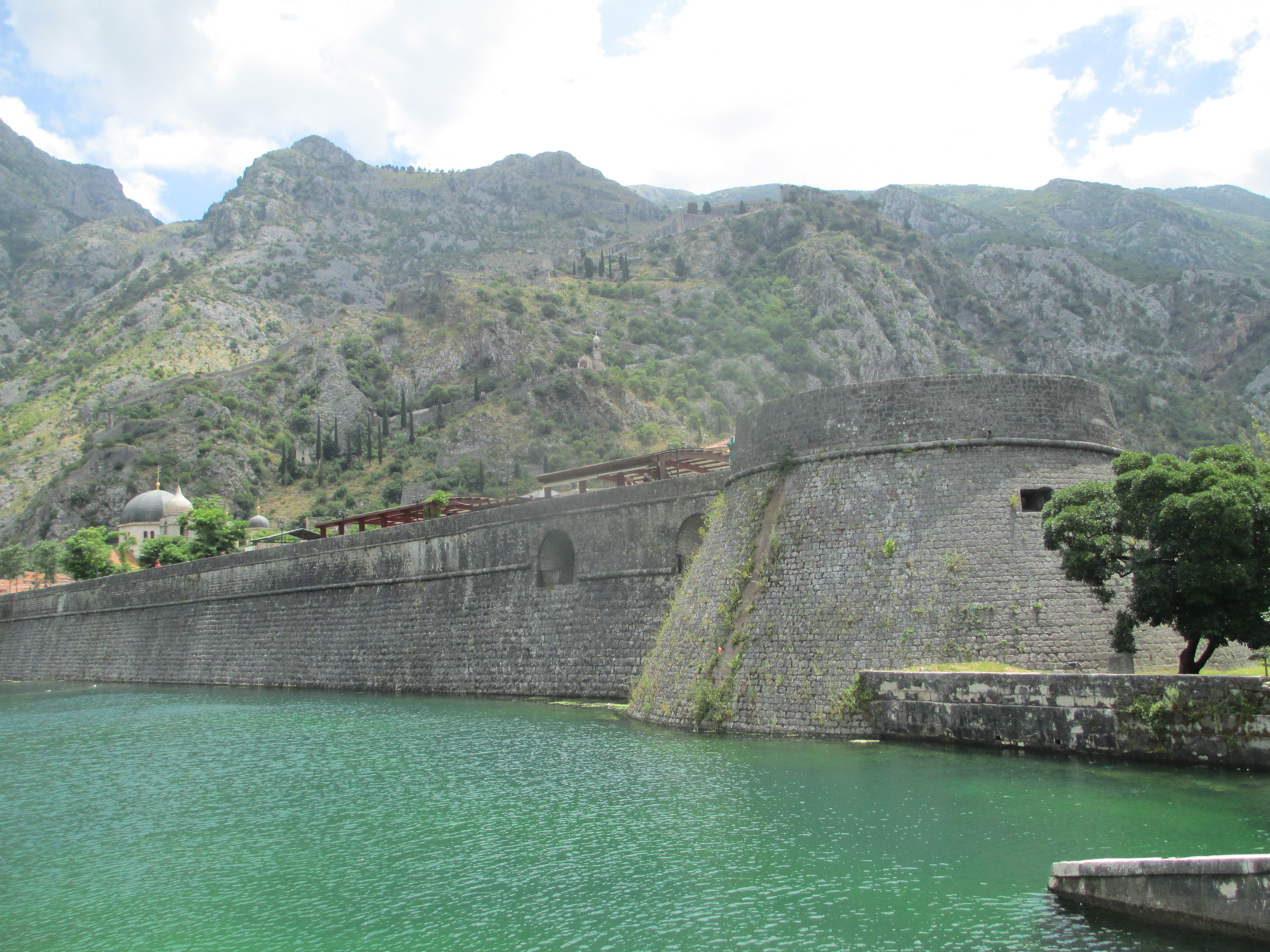 חומת קוטור